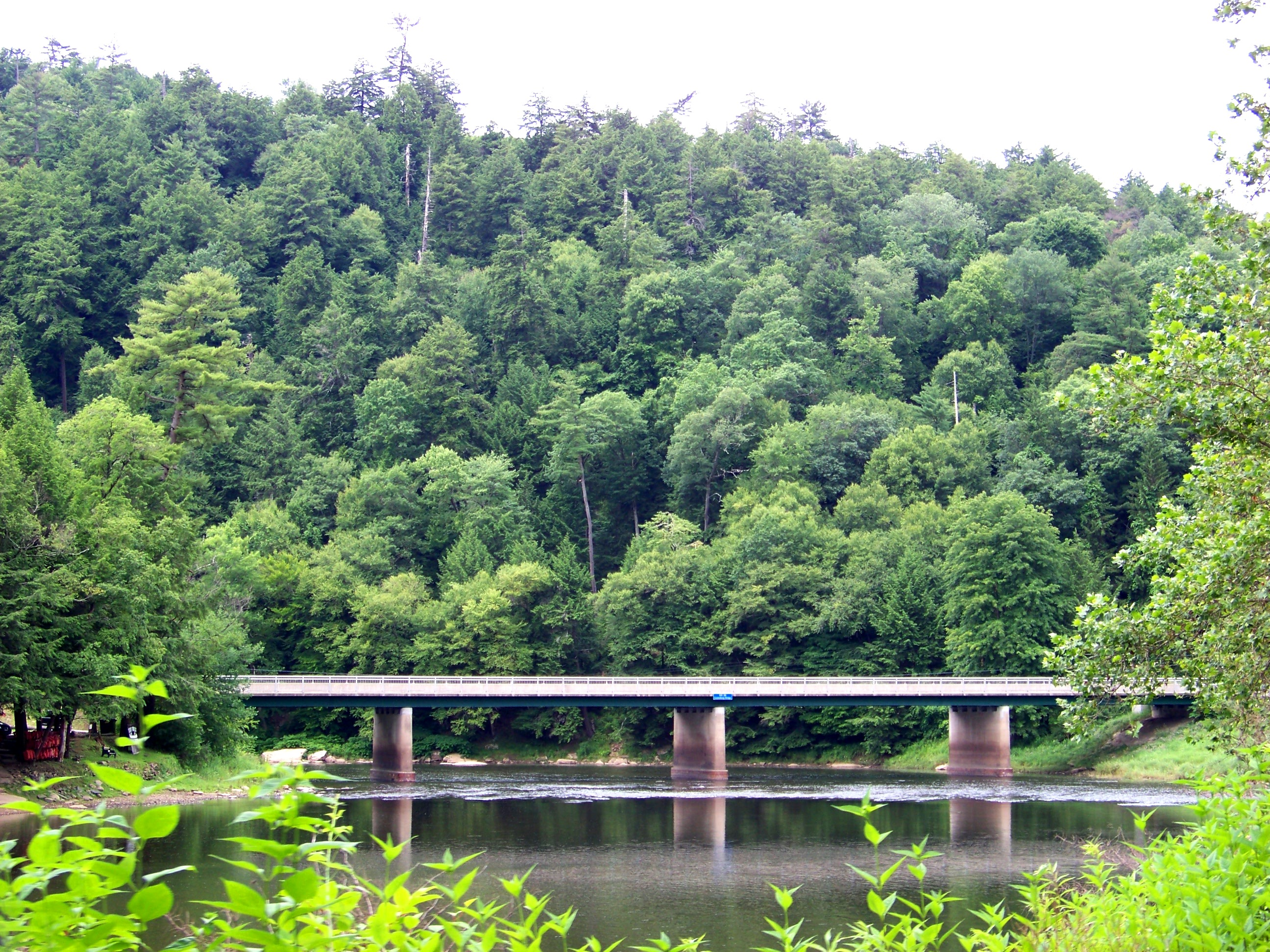 Cooksburg, Pennsylvania